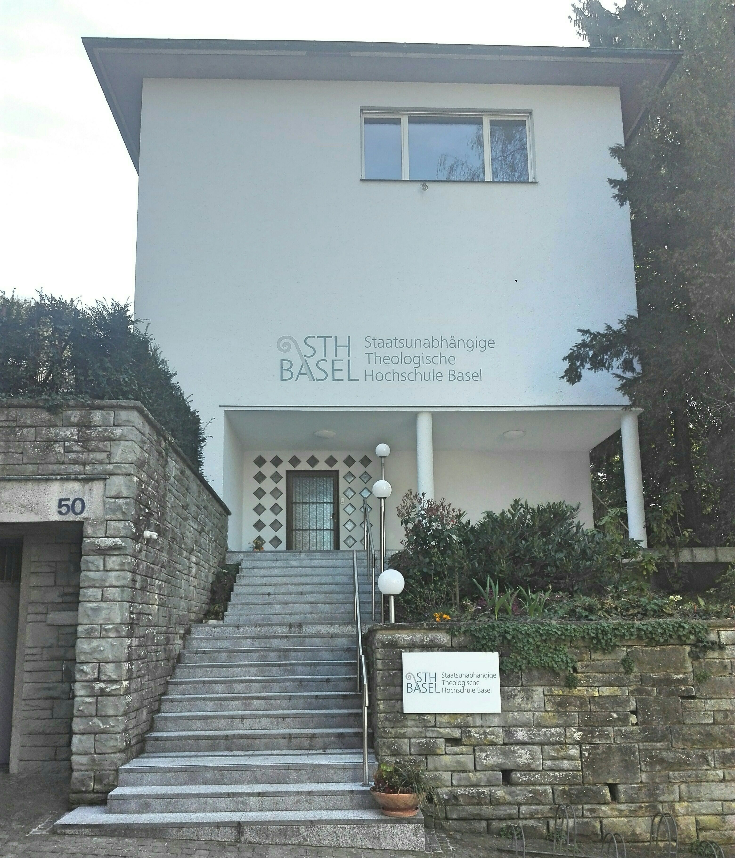 Staatsunabhängige Theologische Hochschule Basel in Riehen